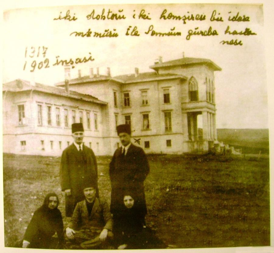 1902 yılında Canik Hamidiye Hastanesi adıyla faaliyete geçen hastanenin önünde çekilen bir fotoğraf. Ayakta sağda Operatör Doktor Hasan Fehmi, solda Dahiliyeci Servet Bey. Oturanlar: ortada İdare Memuru Bilal Sabri, solda Hemşire Belkıs, sağda Hemşire Nebahat. Hastane 1908 yılında Canik Gureba Hastanesi, 1923 yılında Memleket Hastanesi, 1940 yılında Samsun Millet Hastanesi, 1954 yılında Samsun Devlet Hastanesi, 1970 yılında Karadeniz Ruh ve Sinir Hastalıkları Hastanesi ve son olarak 1990 yılında Samsun Ruh ve Sinir Hastalıkları Hastanesi adını almıştır. 2007 yılında çıkan yangın sonucu hasar gören bina günümüzde terk edilmiştir.